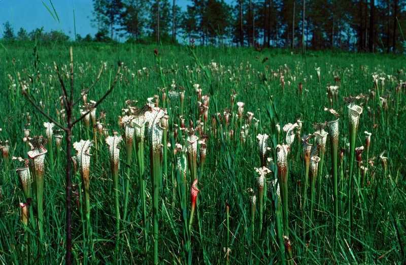 Sarracenia leucophylla in habitat